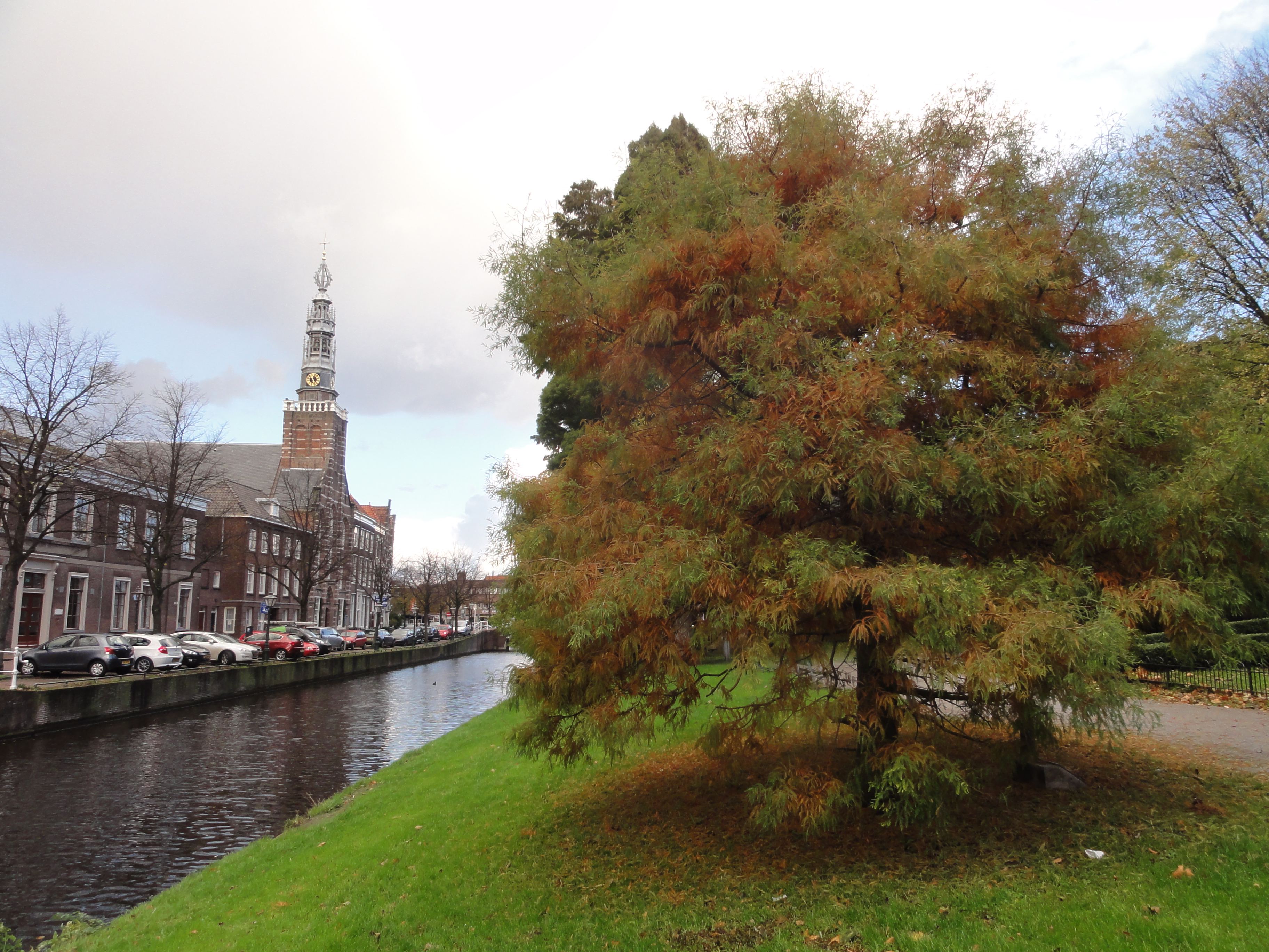 Herinneringsboom (een moerascipres of Taxodium distichum) bij het afscheid van Cees Goekoop bij zijn vertrek als burgemeester door hemzelf geplant op 19 november 1998 in het Van der Werffpark te Leiden.